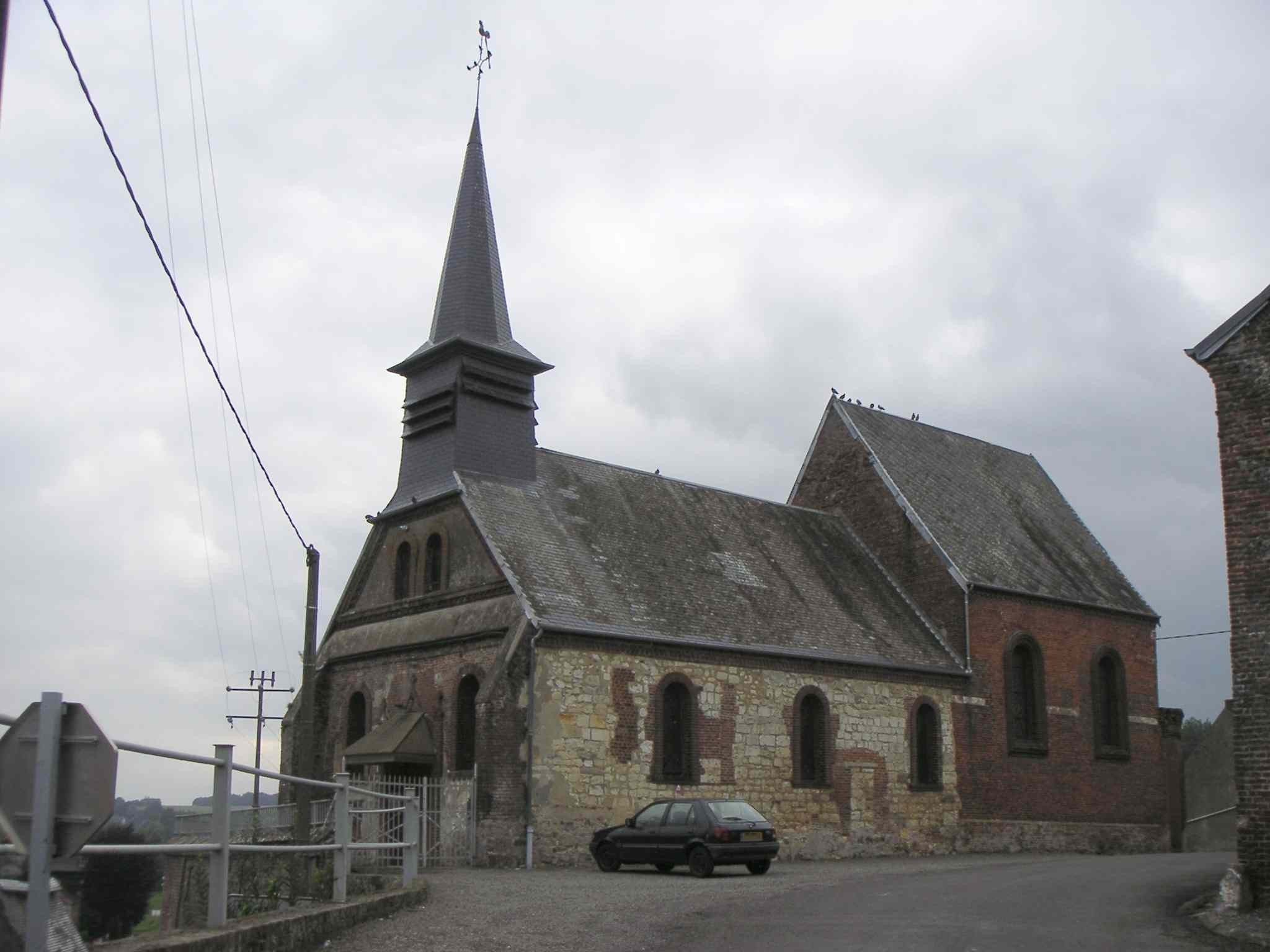 Photo de l'église de Proisy (Aisne, France) prise par User:LonganimE le 01/sept/2005.